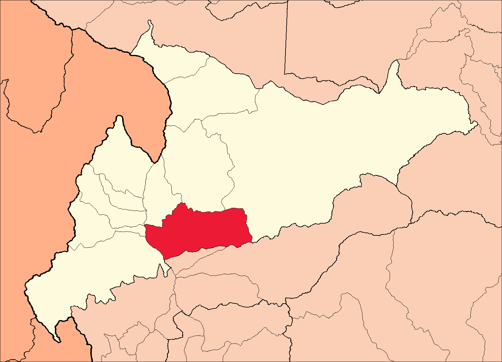 Área del distrito de Jacas Grande dentro de la provincia de Huamalíes.